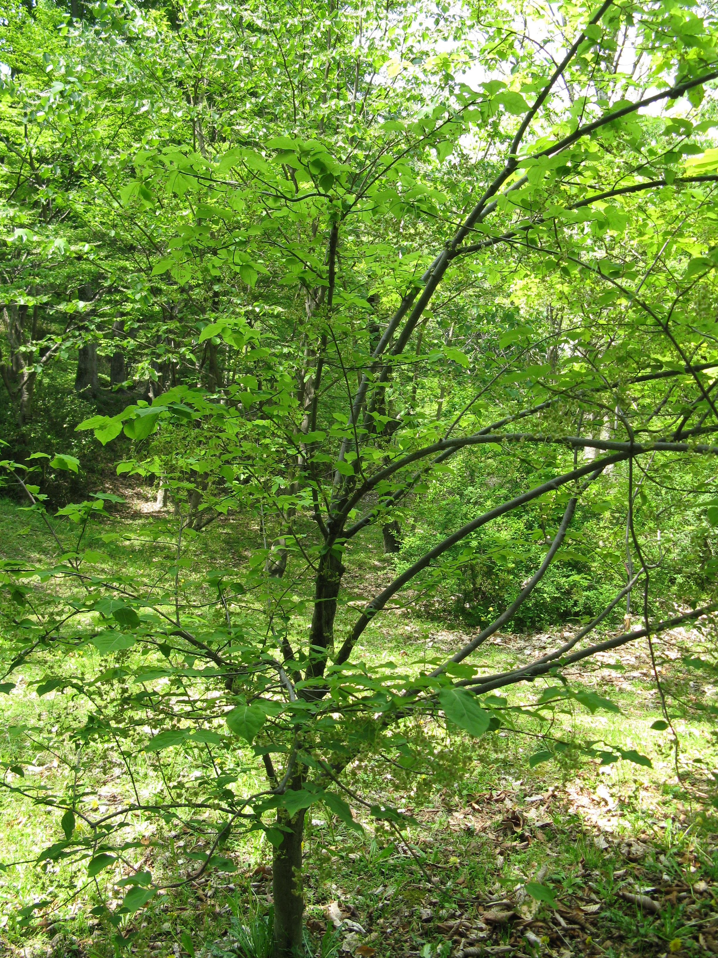 Scientific name Euonymus planipes